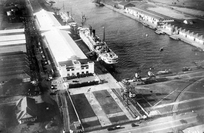 Repronegatief. 'S.S. Jan Pieterszoon Coen' in Tandjoengpriok, de haven van Batavia, Java